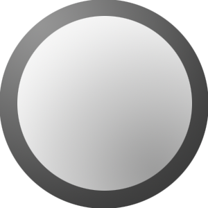 iPhone 5Sホームボタン(スペースグレイ)